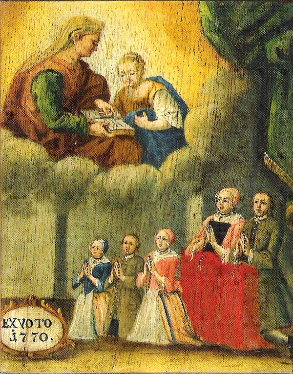 Church St. Anna, München - Harlaching. Dieses Votivbild zeigt oben links das Motiv der Anna, die Maria im Lesen der Bibel unterrichtet, wie es auf dem Altarbild des rechten Seitenaltars dargestellt ist, was als Indiz dafür gilt, dass dieses Altarbild im 18. Jahrhundert das Gnadenbild der Kirche war.